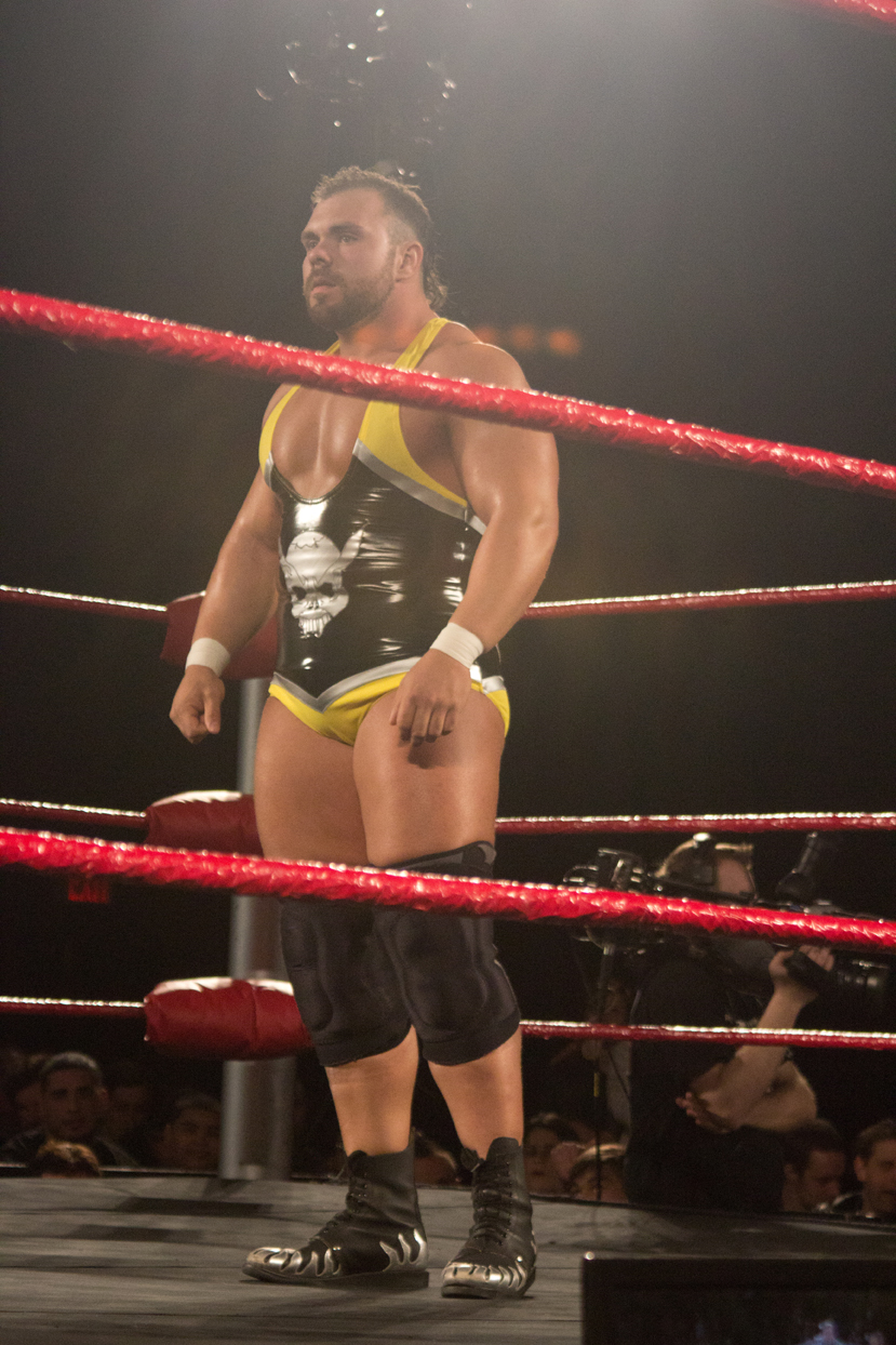 ROH Wrestler Michael Elgin